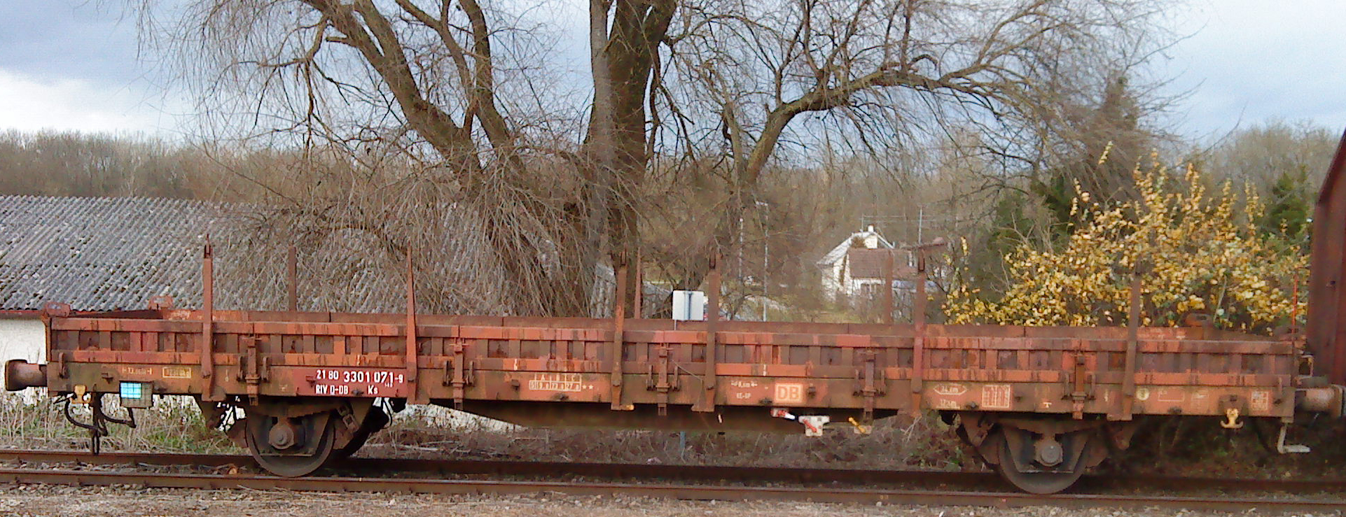 Zweiachsiger Flachwagen der Regelbauart mit Schwenkrungen ohne Handbremse, gebaut für die DR ab 1969, Leitzahl: 62.03, GSNR: 3300